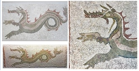 Rappresenta un antico mosaico,raffigurante un drago, denominato Drago di Kaulon, dal luogo dove fu riscontrato la prima volta.